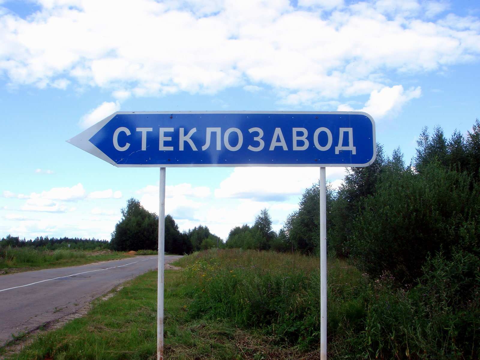 Указатель на посёлок Стеклозавод (официальное название Красный Луч), Нижегородская область, Россия.